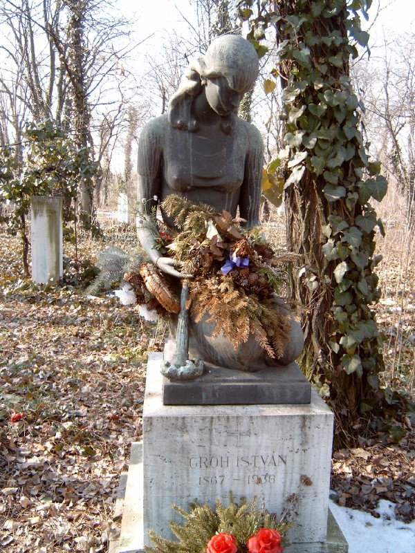 Gróh István sírja Budapesten. Kerepesi temető: 48/3-1-25 [szobrász: Benkő Rezső].